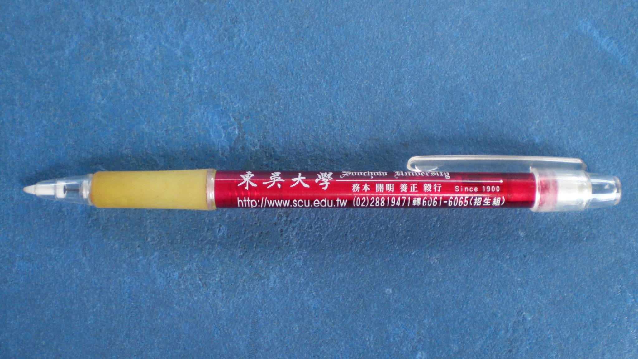 中文（台灣）: 2000年代東吳大學贈品用自動鉛筆。